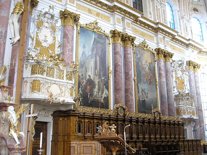 Klosterkirche Fürstenfeldbruck (Oberbayern). Der Chor, Nordseite. Eigene Aufnahme, Jan 2007 / Fürstenfeldbruck monastery (Upper Bavaria, Germany). The church. Northern side of the choir. Own photo, Jan 2007